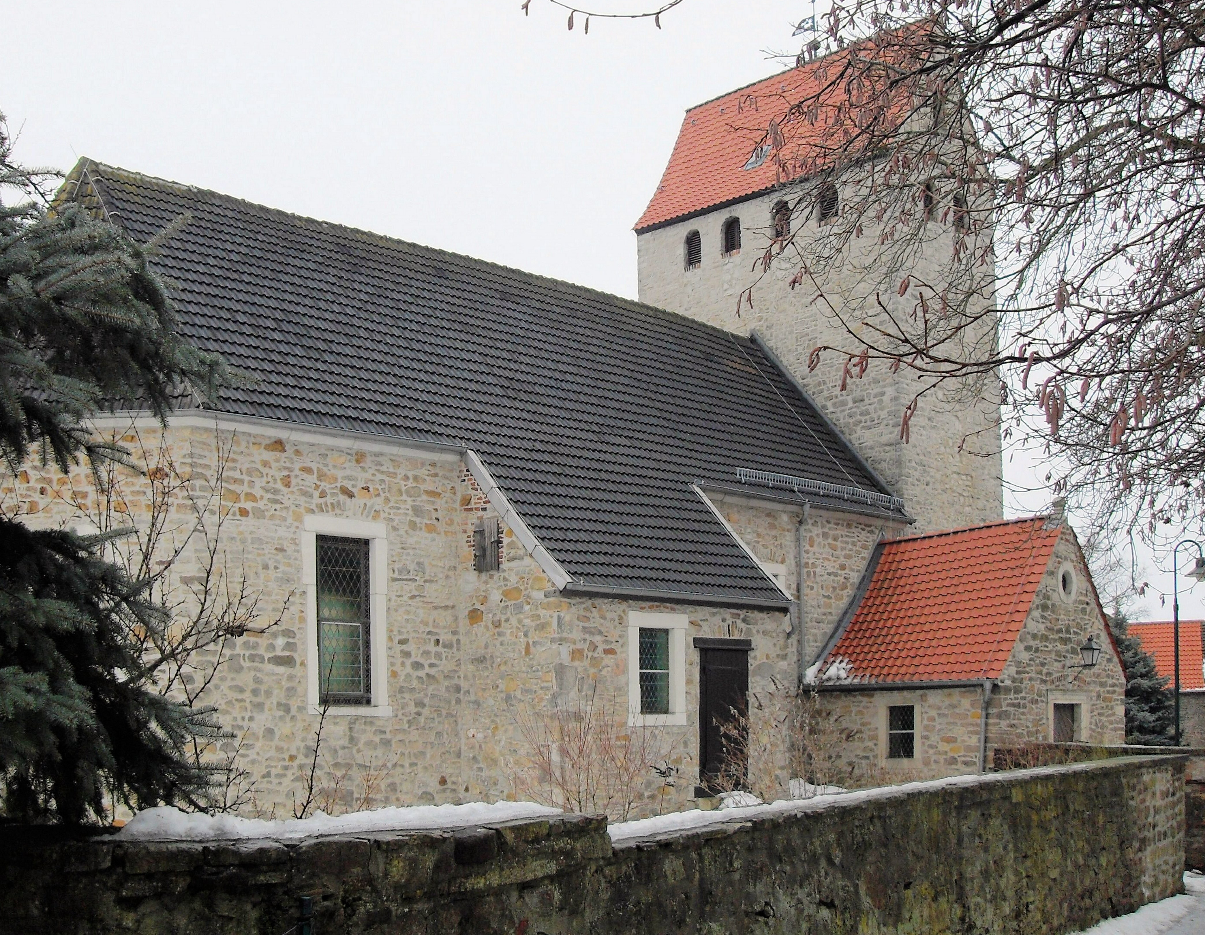 evangelische Kirche St. Marien in Hakenstedt, Gemeinde Erxleben, Landkreis Börde, Deutschland